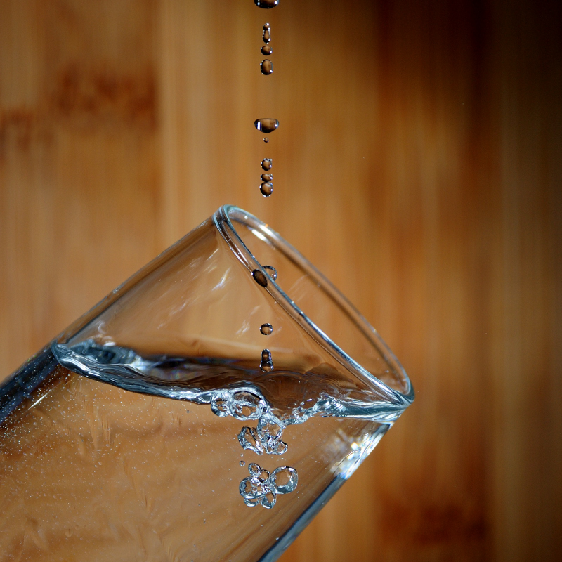 Brindis